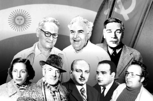 Fundadores y dirigentes históricos del comunismo argentino reivindicados por el PCCE. De arriba para abajo y de izquierda a derecha: Rodolfo Ghioldi, Victorio Codovilla, Luis Emilio Recabarren, Alcira de la Peña, Benito Marianetti, Juan Ingalinella, Jorge Calvo y Alberto Cafaratti.